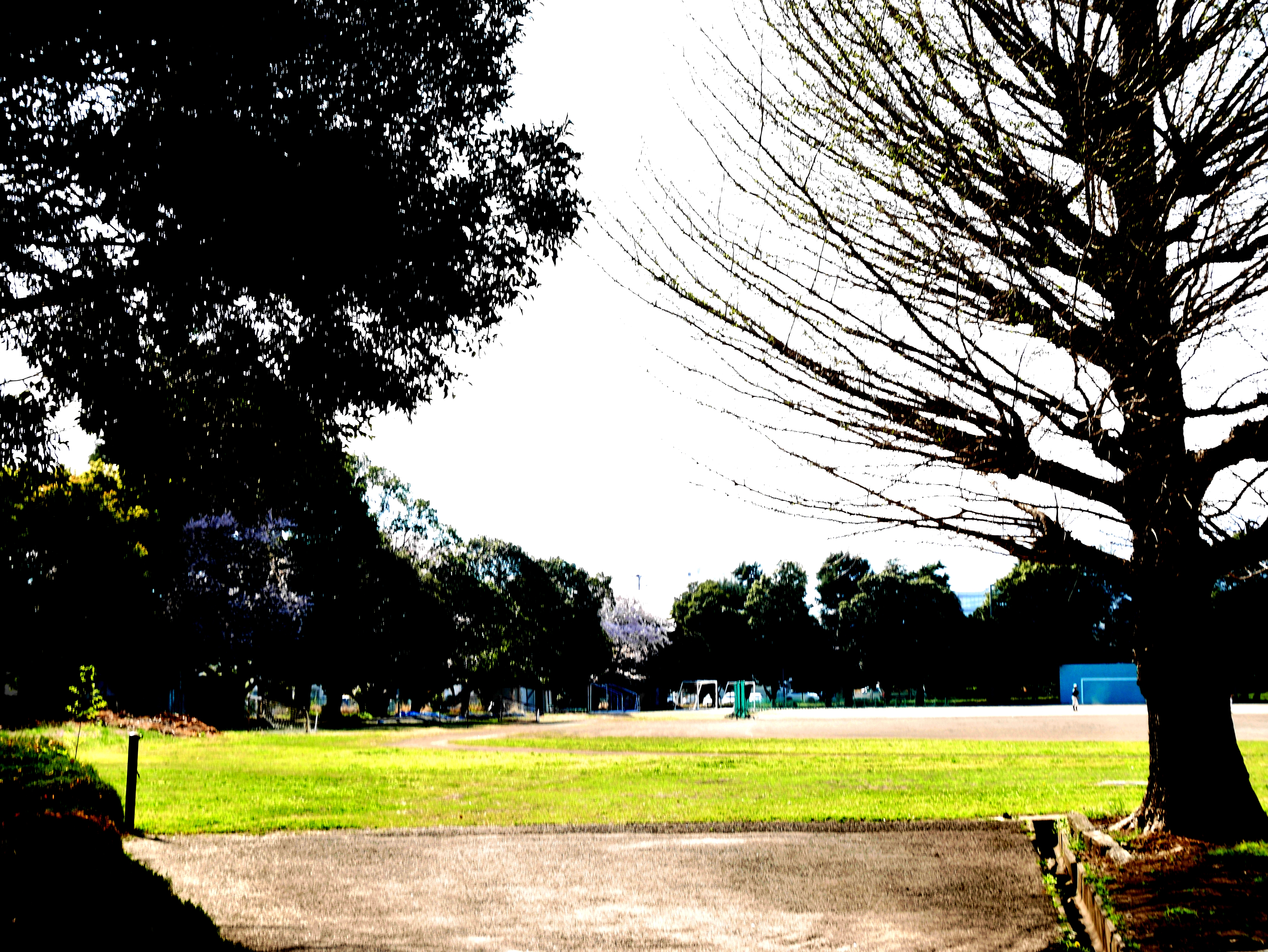 厚木高等学校グラウンド